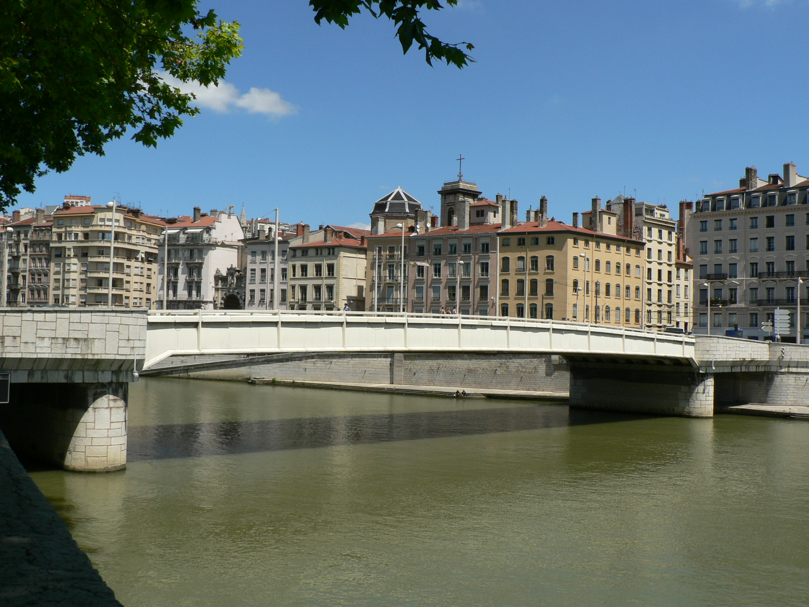 Ponts de Lyon - Pont la Feuillée